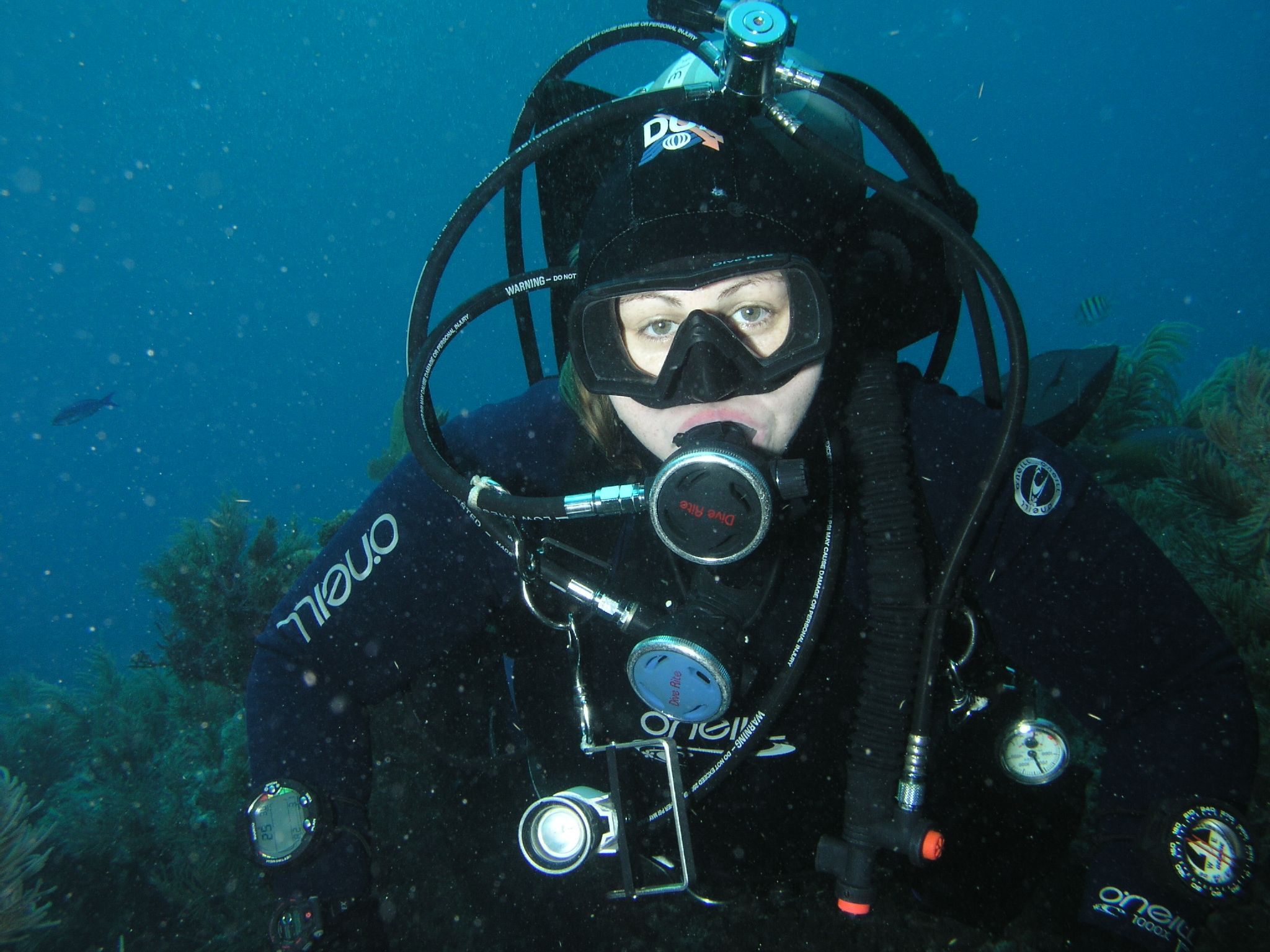 Molasses Reef, dir diver